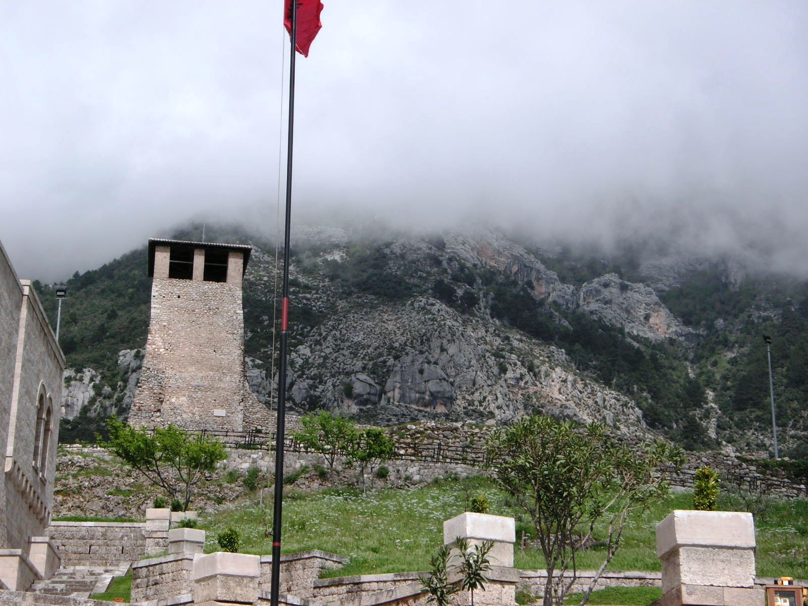 Castillo de Krujë.